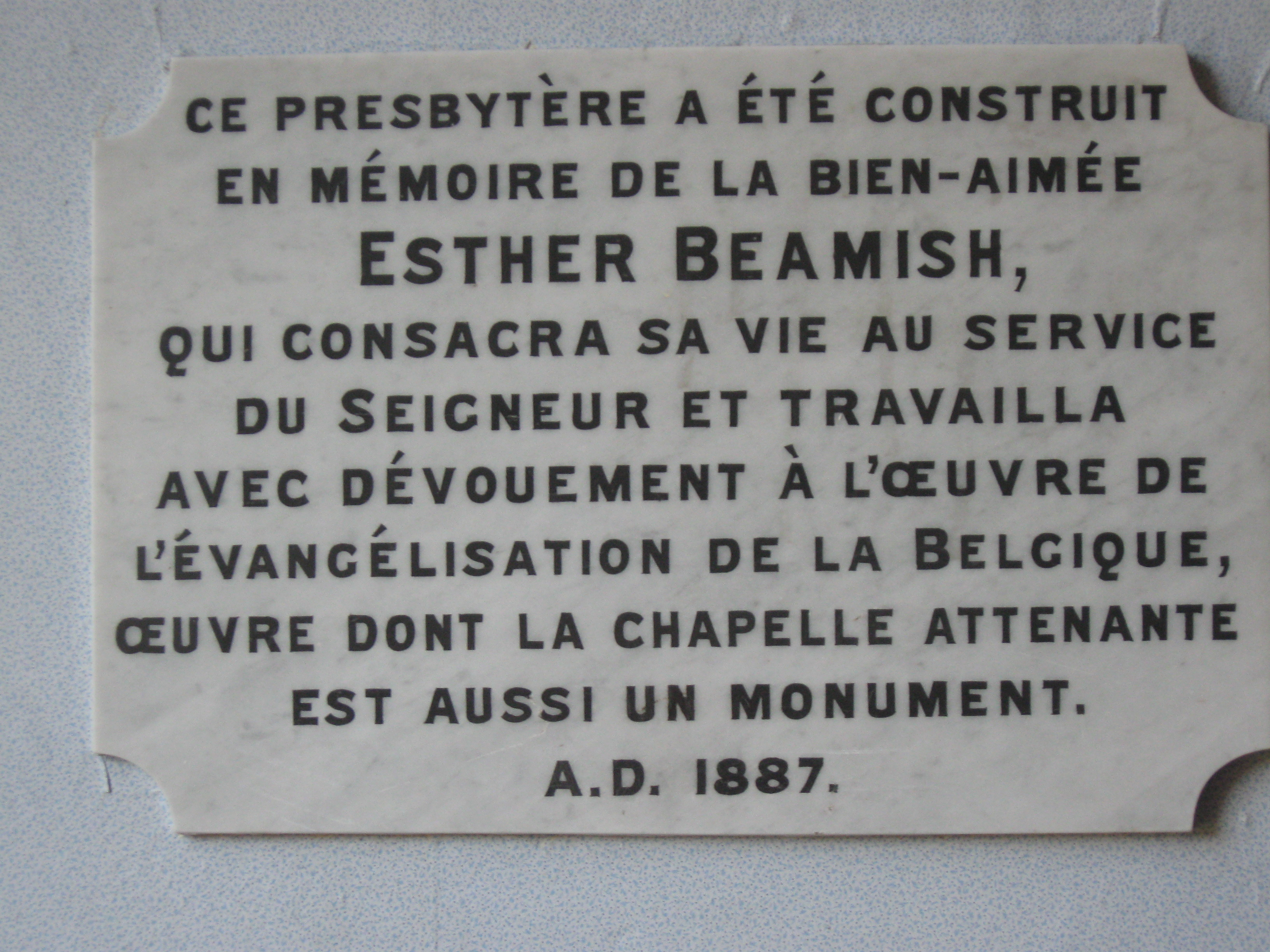 Stèle à la mémoire d'Esther Beamish, scellée dans le hall d'entrée du presbytère de Spa